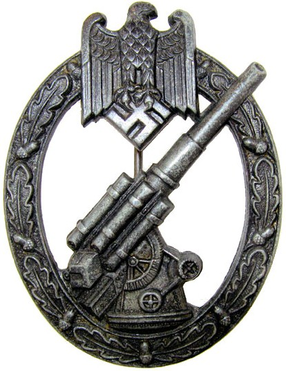 Third Reich Army Anti-Aircraft Badge